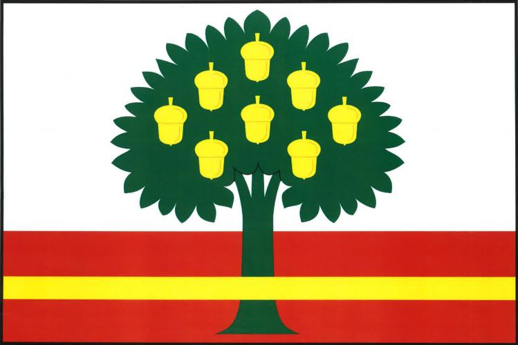 Plískov vlajka